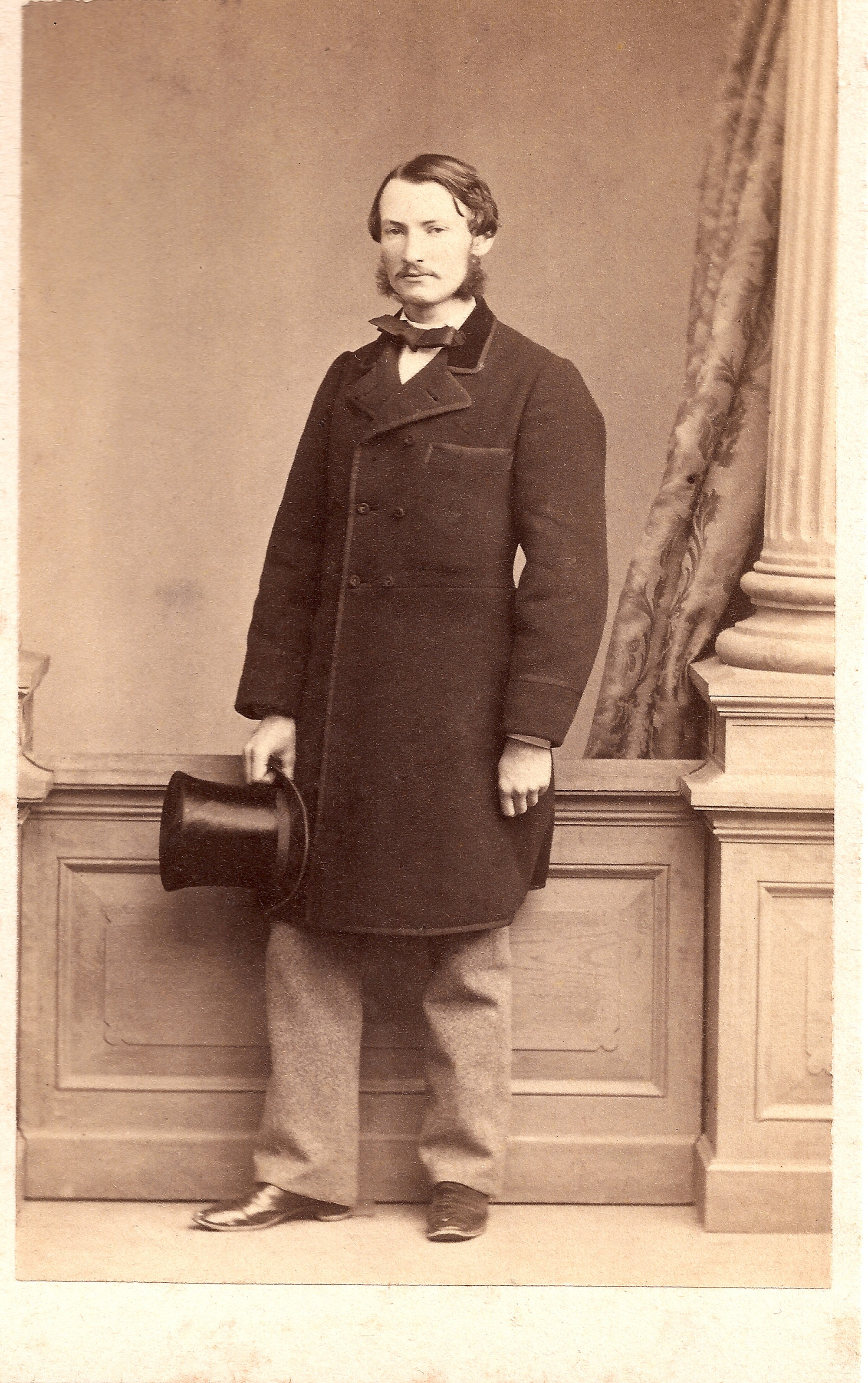 Carl Friedrich Haug junior, Sohn des Historikers Carl Friedrich Haug, war Regierungsbaumeister und Papierfabrikant in LouisenthalLouisenthal. Fotografie, Albuminpapier